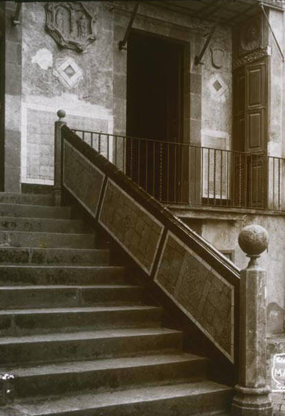 Imatge